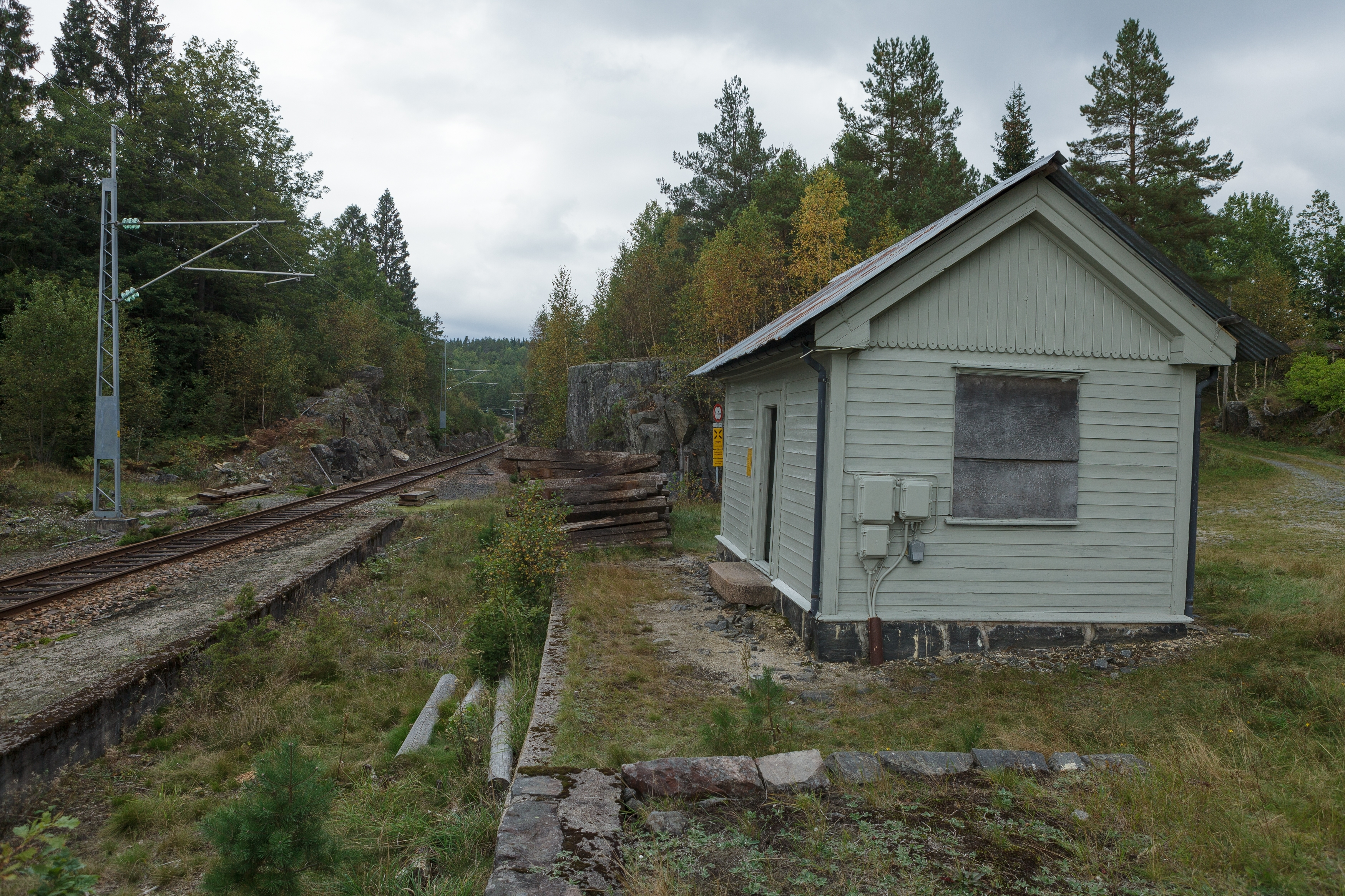 Haugsjå jernbanestasjon. Den gamle stoppestaden på Haugsjå med elektrifiserte jernbanelinja til venstre. Haugsjå jernbanestasjon kom som stoppestad på Arendalsbana i 1910 og var betjent fram til 1928, og i 1997 vart stoppestaden nedlagt. Sett mot N. Fotograf Dag Endre Opedal.